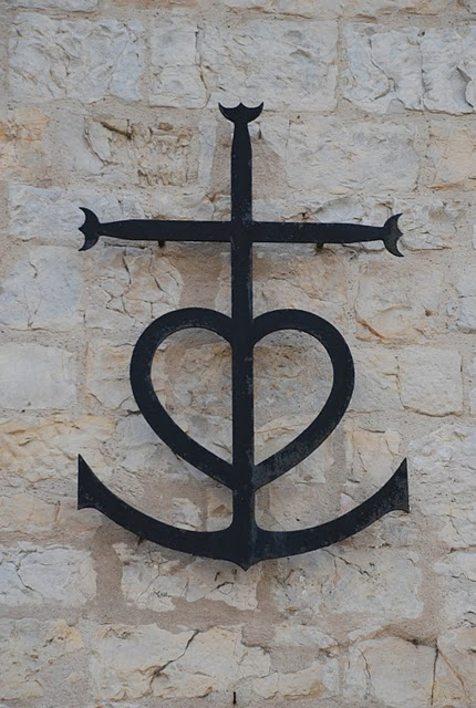 Croce in ferro forgiato. Detta "croce della Camargue". Dalla Facciata della Chiesa di Saintes Maries de la Mer, Francia